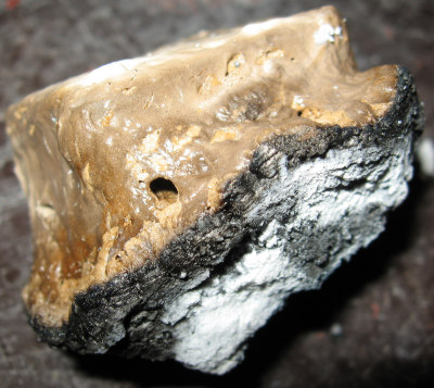 Aufgeschäumte Brandschutzbeschichtung nach dem Versuch